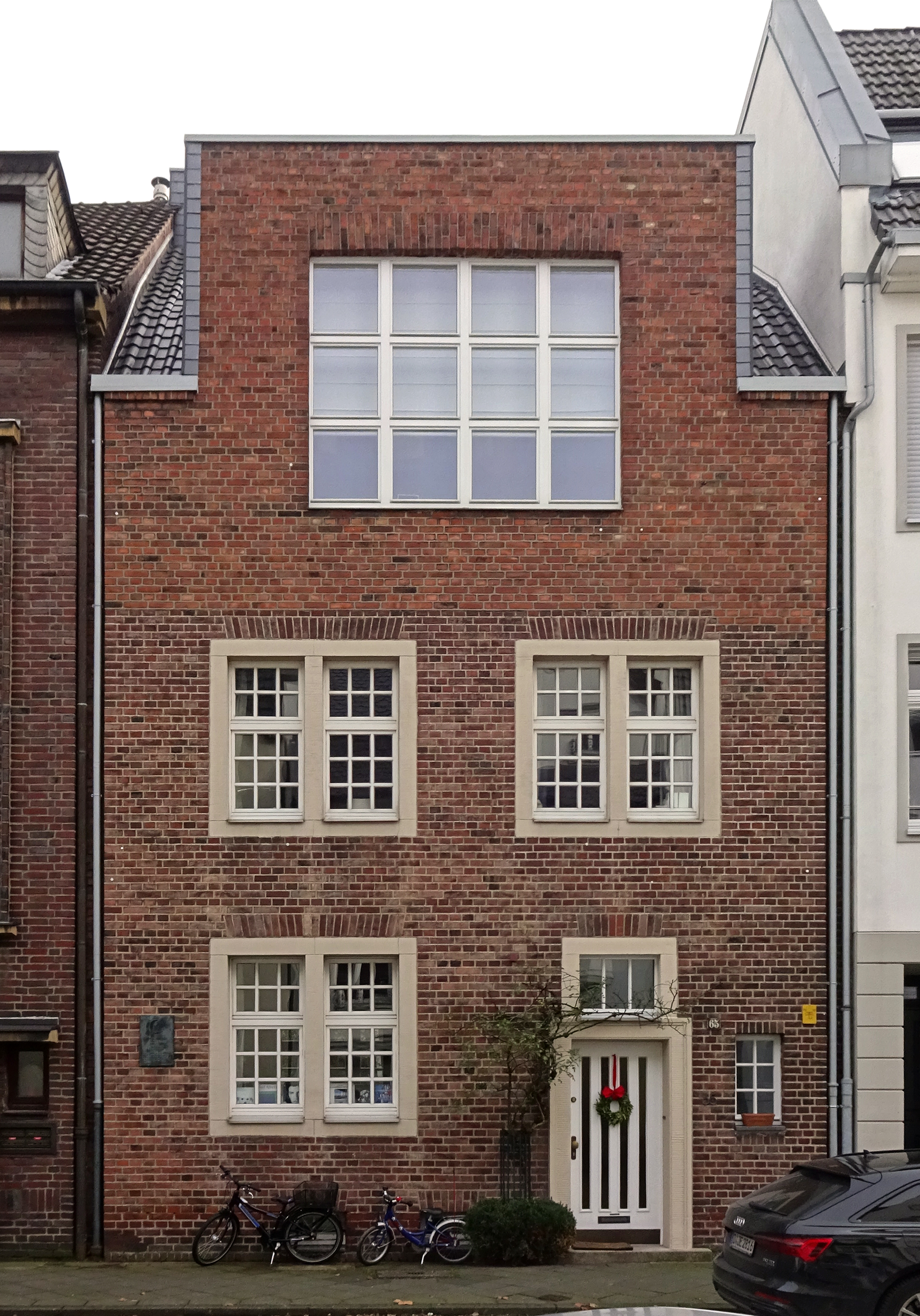 Haus Brend'amourstraße 65, Düsseldorf-Oberkassel, In der Brend'amourstraße 65 in Düsseldorf baute das Ehepaar Hulda und Otto Pankok 1924 ein Giebelhaus nach holländischem Vorbild, welches sie nach der Geburt der Tochter Eva 1925 bezogen.